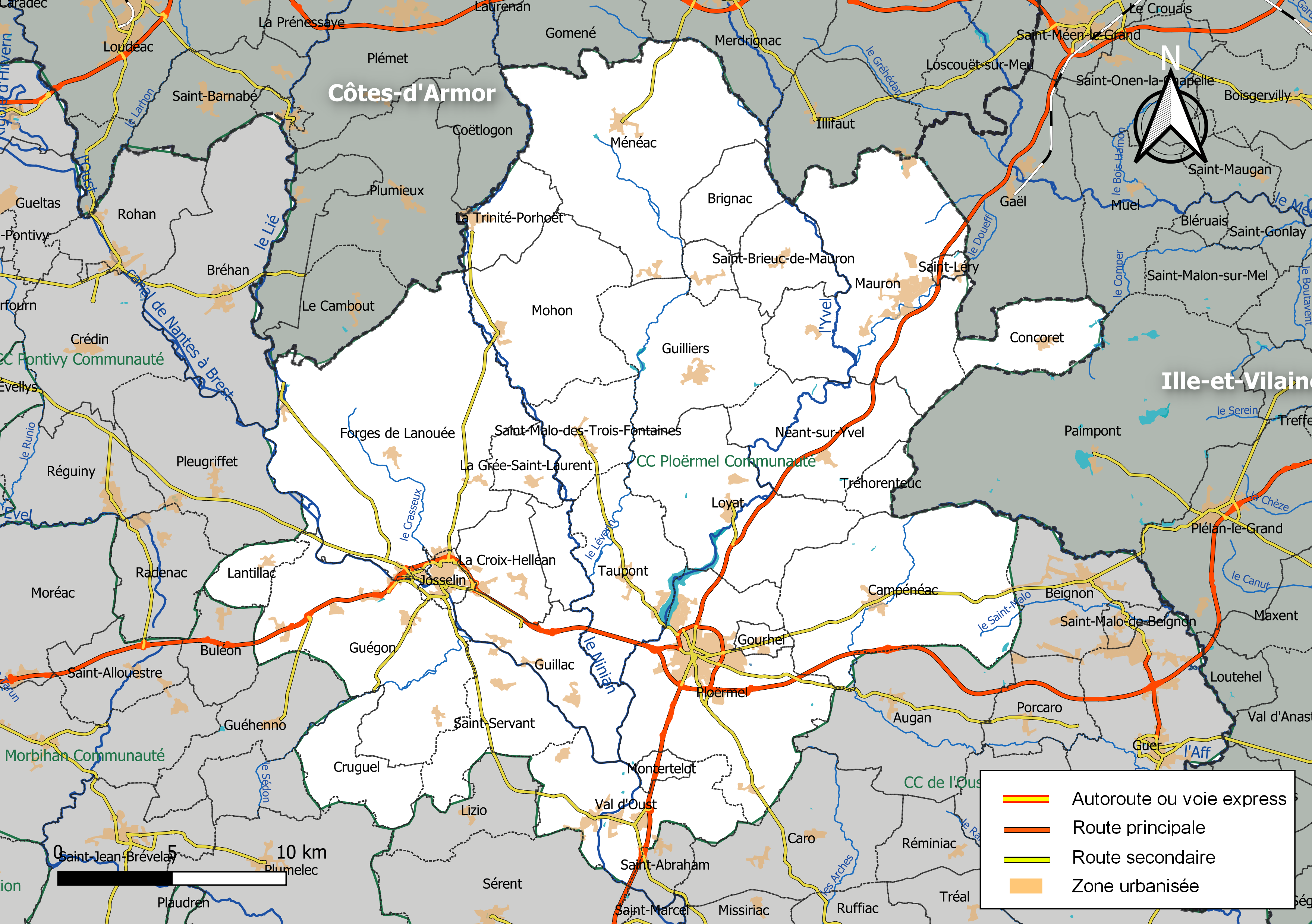 Carte géographique de l'intercommunalité Ploërmel Communauté, département du Morbihan, France. Composition au 1er janvier 2019.